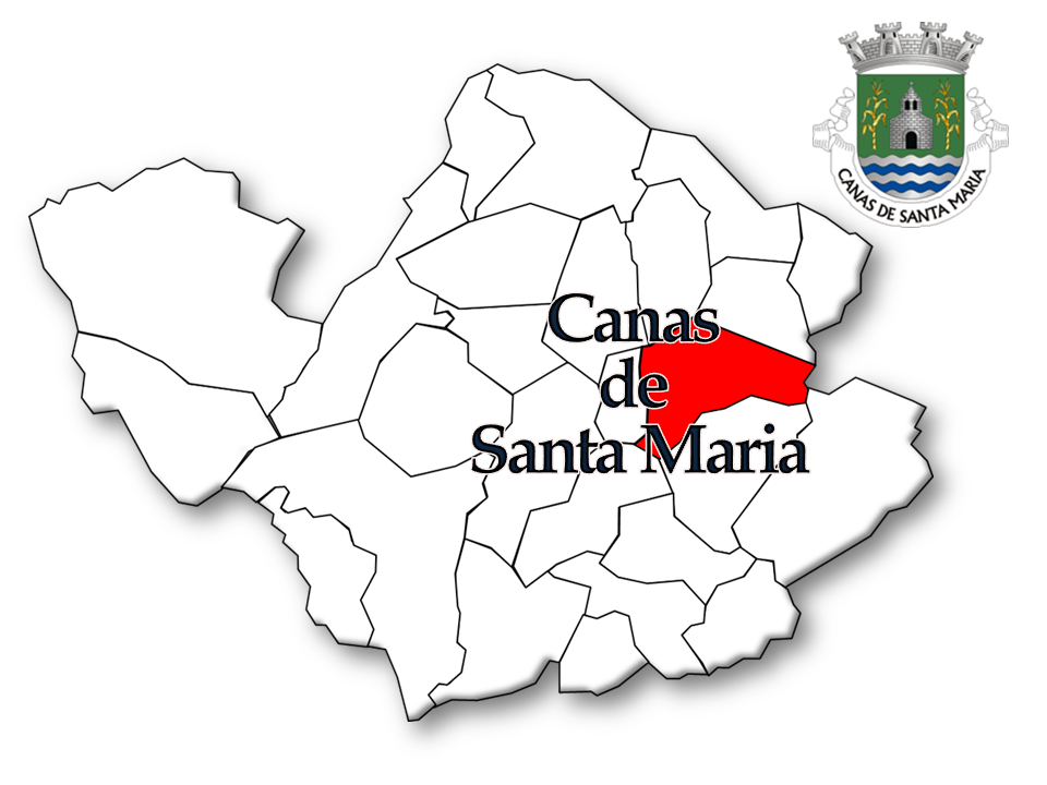 População